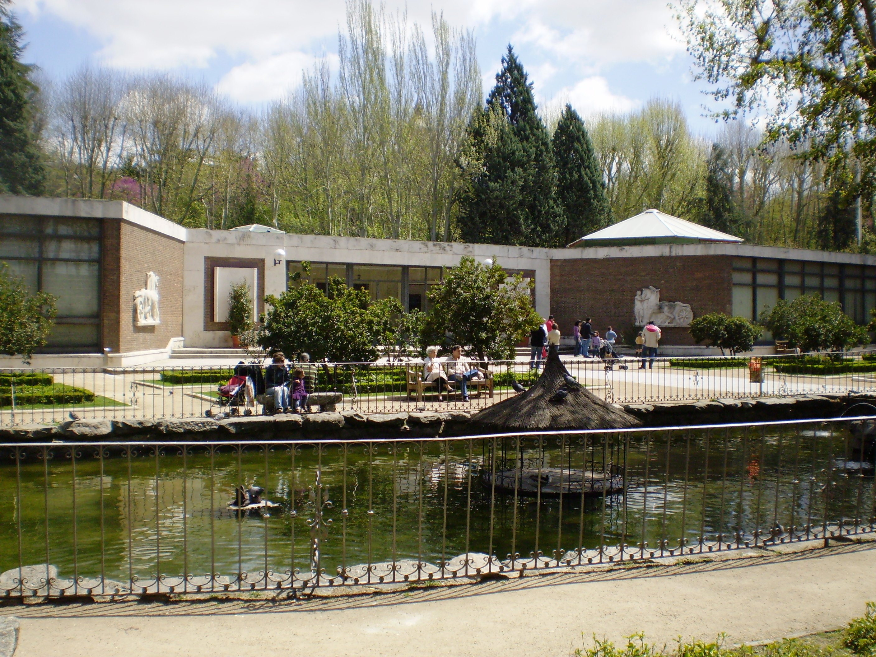 Museo de Carruajes, in Campo del Moro, Madrid, Spain